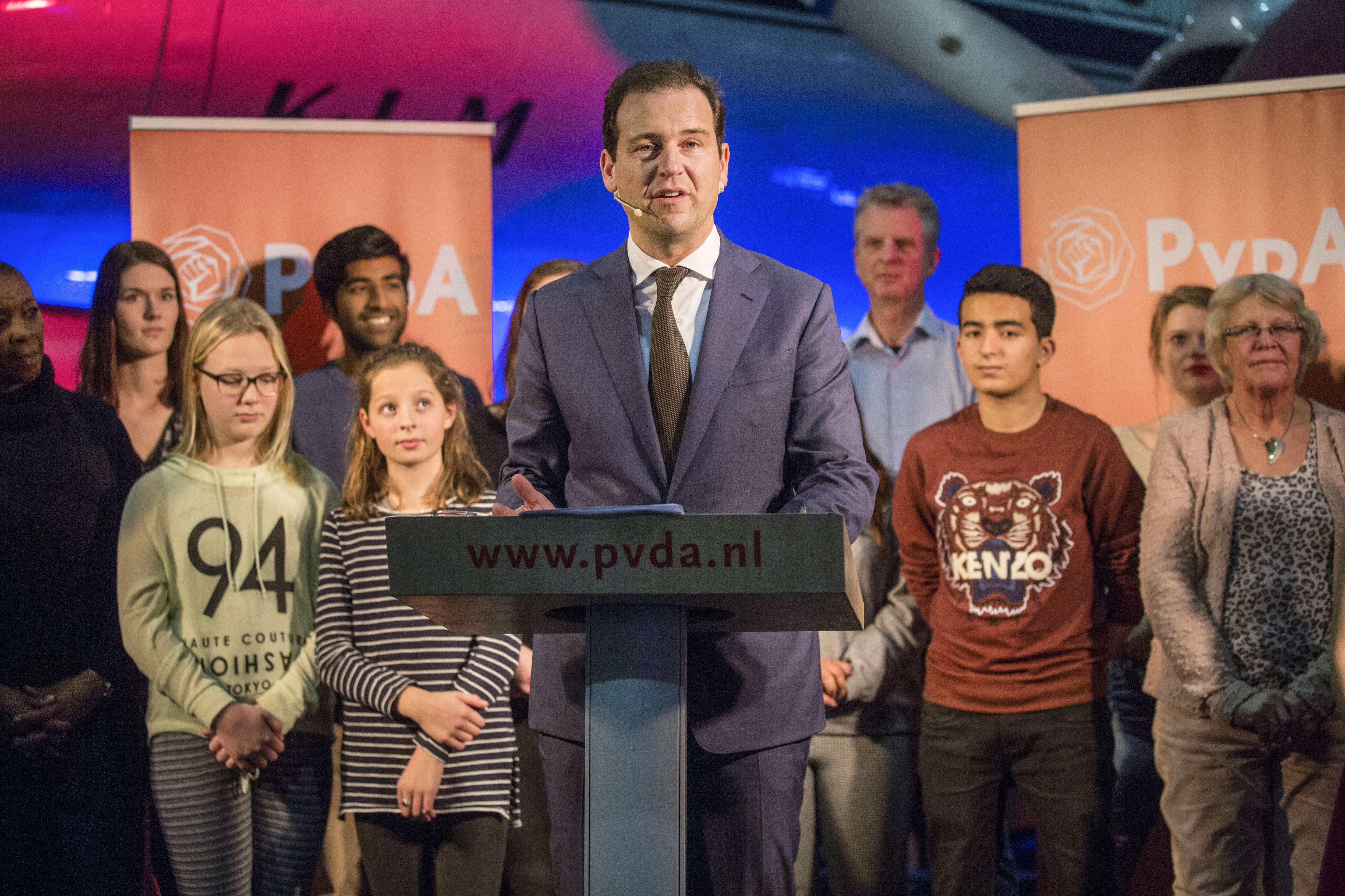 Nederland, Lelystad, 17-12-2016 Tijdens de ledendag van de PvdA op het terrein van het Aviodrome al waar Lodewijk Asscher een speech hield. Foto De Beeldredaktie / Marco Okhuizen